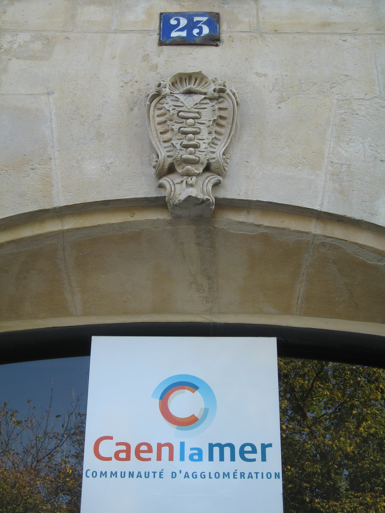 Hôtel Daumesnil à Caen (Calvados) : coquille XVIIIe